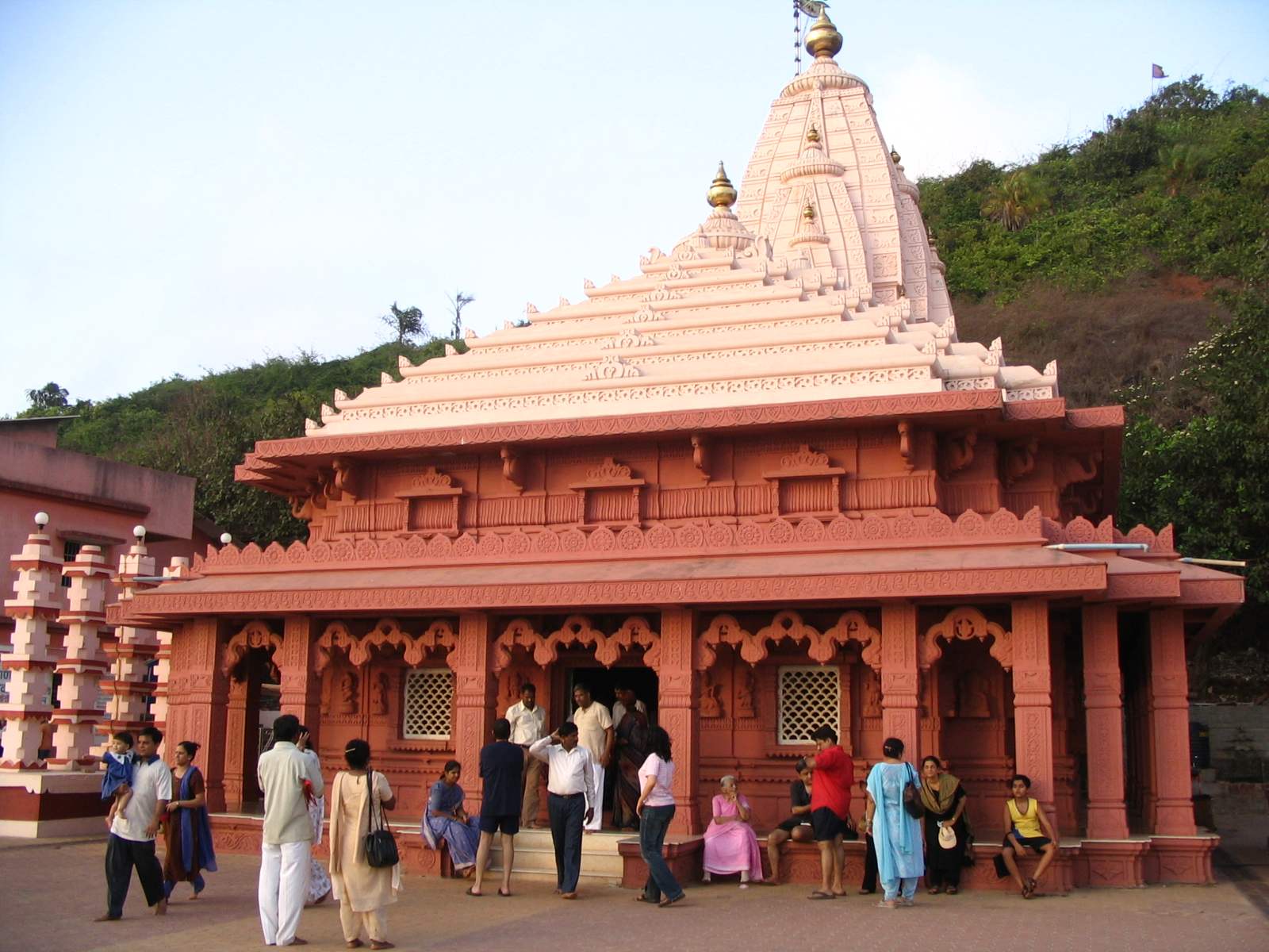 Ganpati Temple, Ganpatipule